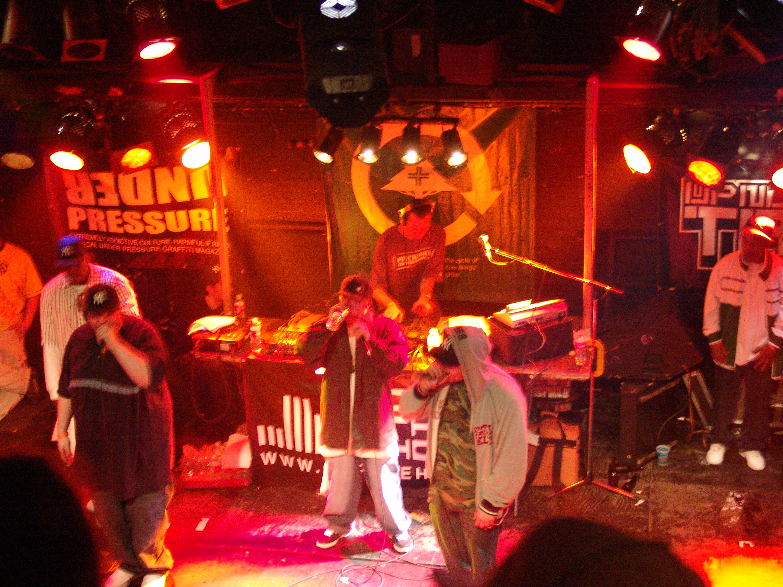 Non PhixionNon Phix